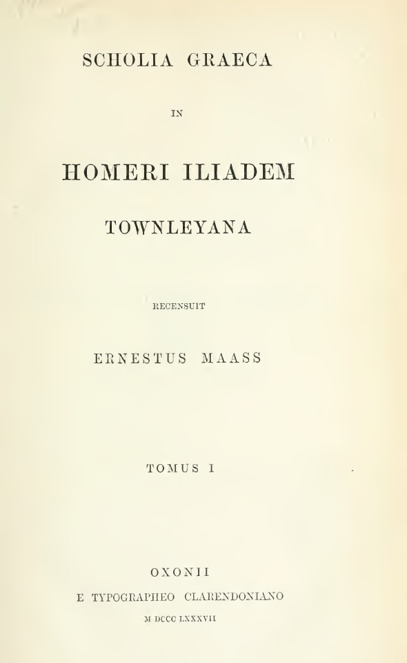 Frontespizio